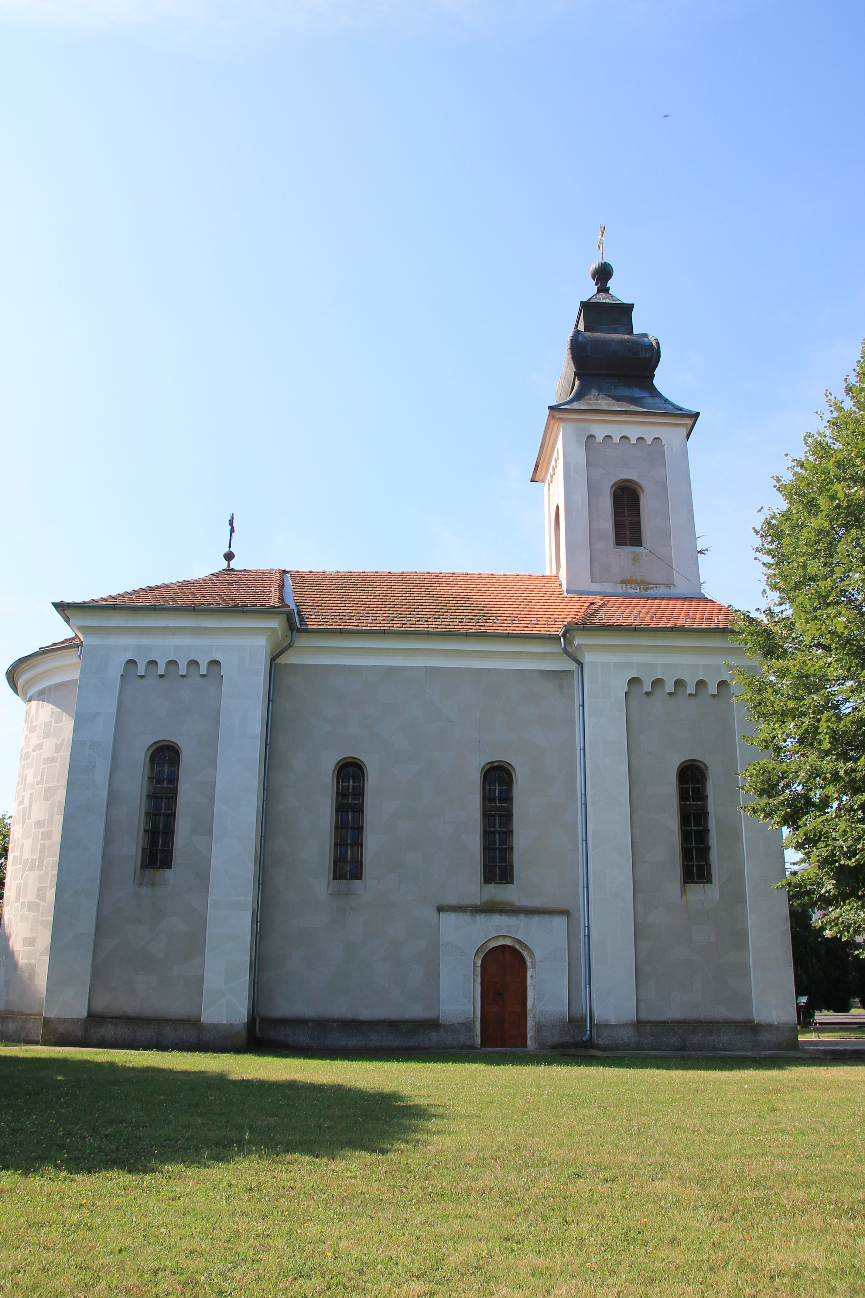 Crkva Sv. Georgija (Popović)